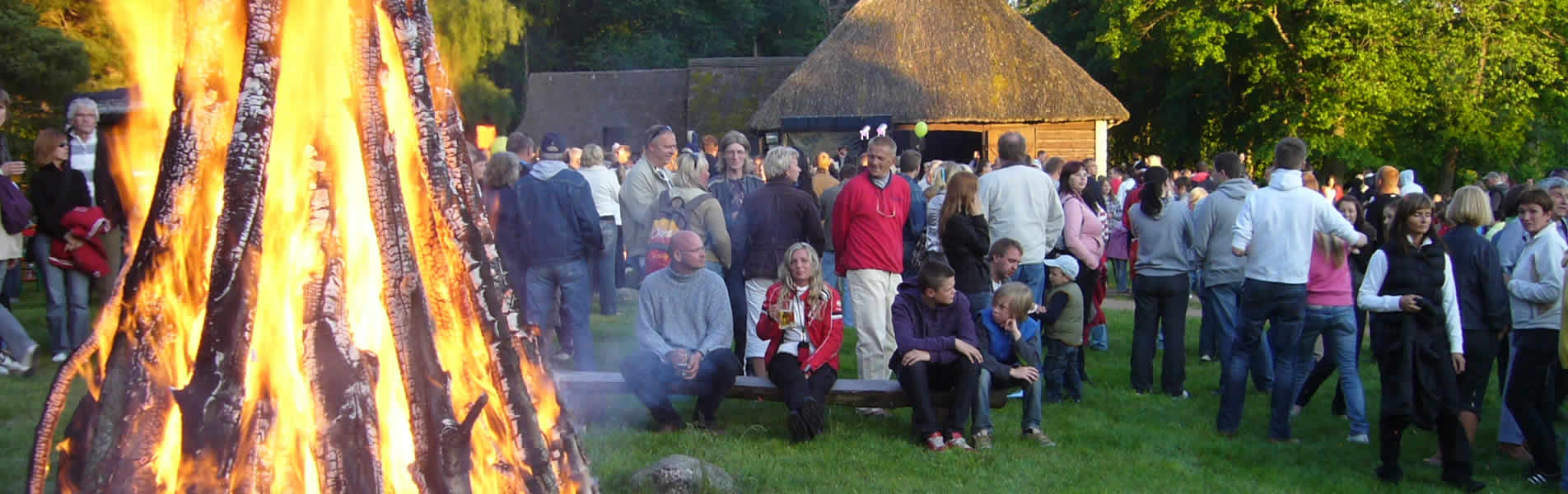 Die Mittsommerfeier an der Taverne von Altja beginnt ...